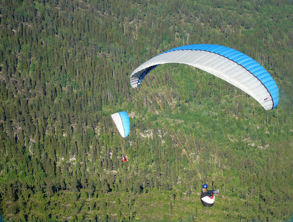 To paraglidere som flyr termisk hang i Hvittingfoss den 10. juli 2006.